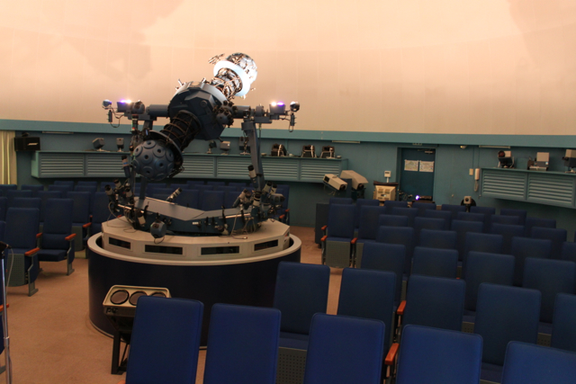 （ドーム径:12m、メーカー:ミノルタ、座席数:120席）